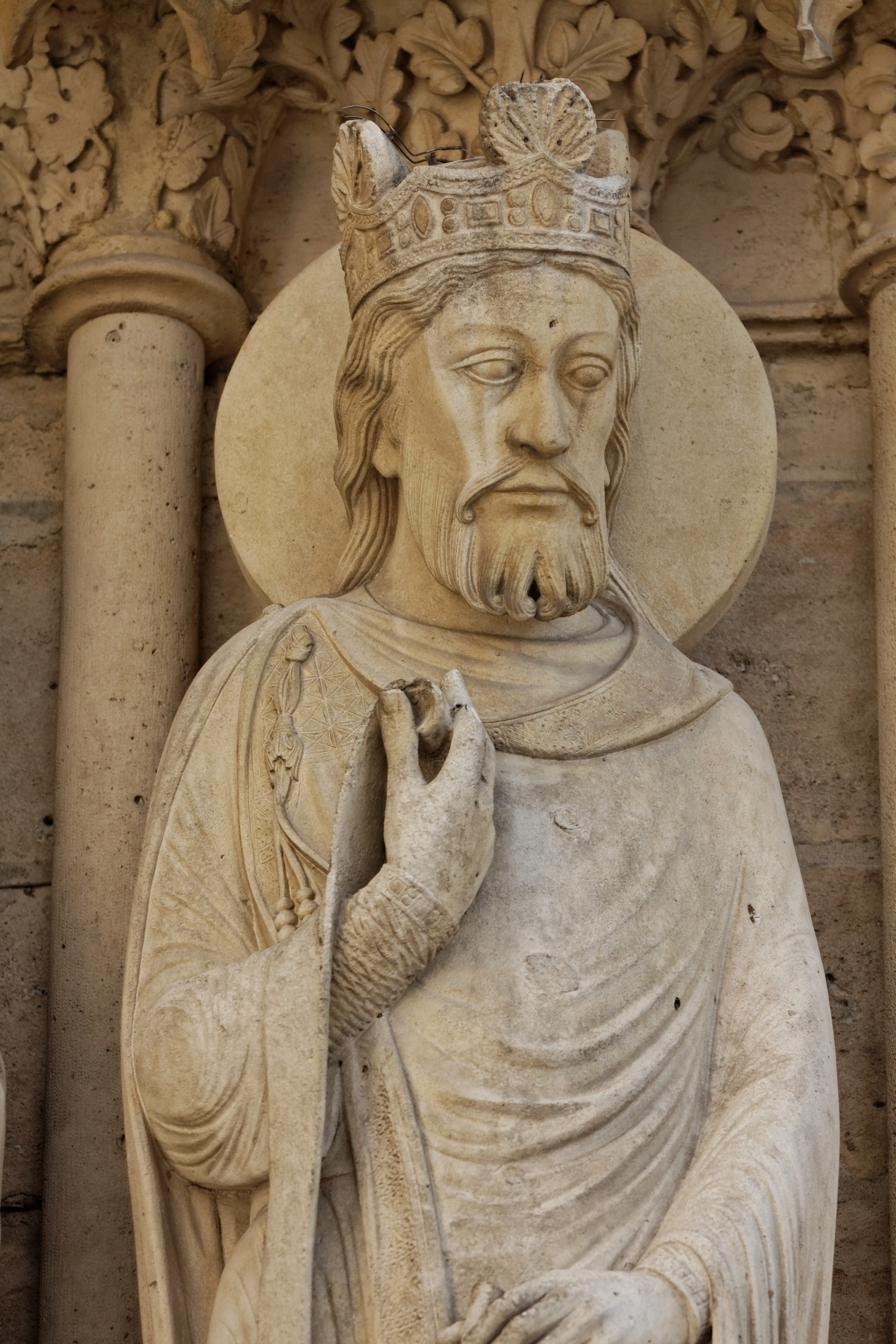 Vue d'un détail du portail Sainte Anne sur la façade ouest de la cathédrale Notre-Dame de Paris.